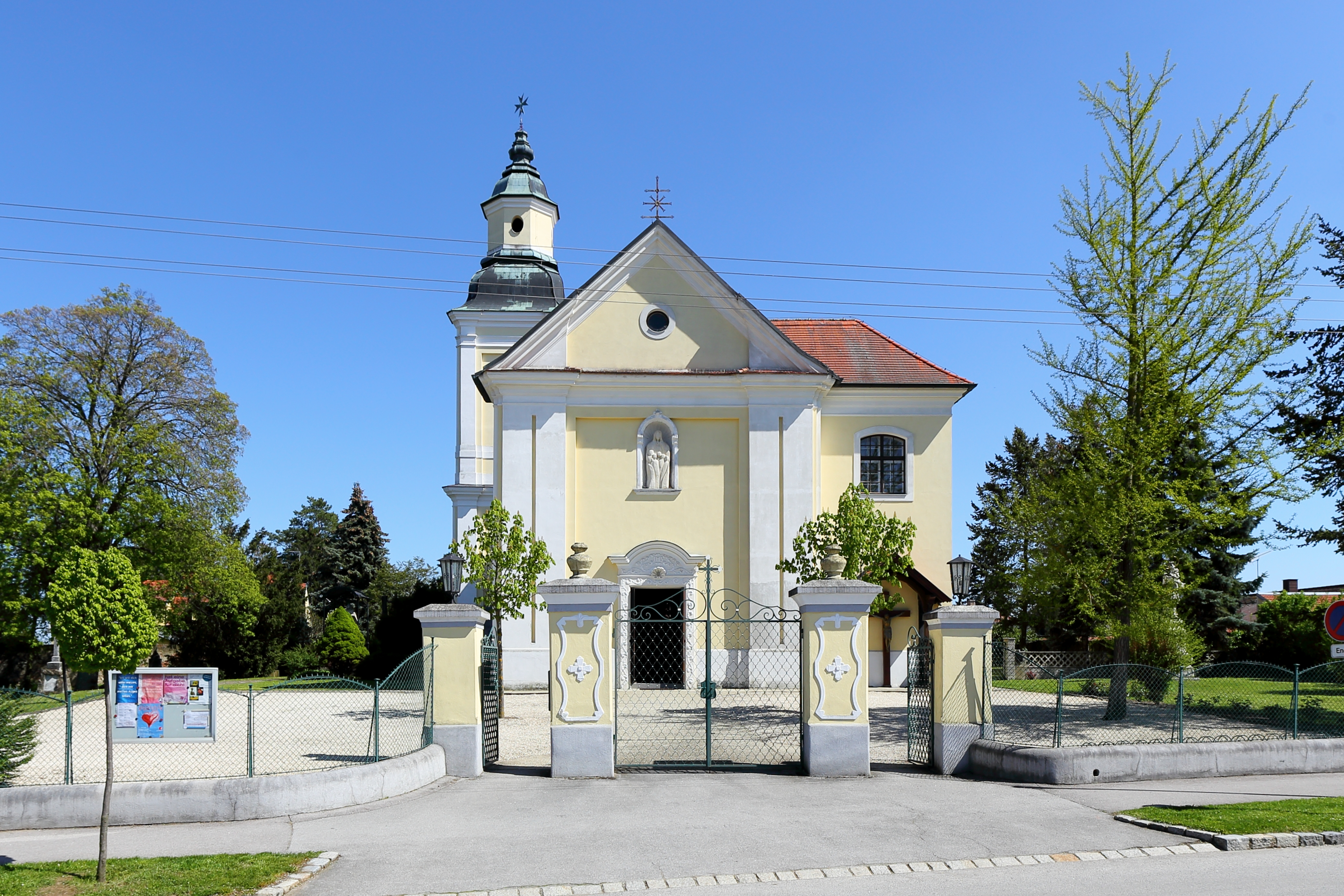 Westansicht der römisch-katholischen Pfarrkirche Auffindung des hl. Kreuzes der niederösterreichischen Marktgemeinde Hohenau an der March.Die Kirche, inmitten des ehemaligen Friedhofes gelegen, wurde in drei Bauphasen errichtet. Der quadratische Chor und die anschließenden 2 1/2 Joche des Langhauses sind romanisch (12. Jahrhundert). Drei Langhausjoche, der Turm und die beiden ersten Joche des südlichen Seitenschiffes (alte Sakristei und ehemalige Barbarakapelle) stammen aus dem Wiederaufbau bzw. Umbau Ende des 17. Jahrhunderts. Zur 19./20. Jahrhundertwende erfolgte eine Kirchenerweiterung in barockisierenden Formen. Dabei wurde unter anderem das Langhaus um zwei Joche verlängert, die alte Sakristei und die Barbarakapelle in den Neubau des südlichen Seitenschiffes integriert und die Westfassade errichtet.